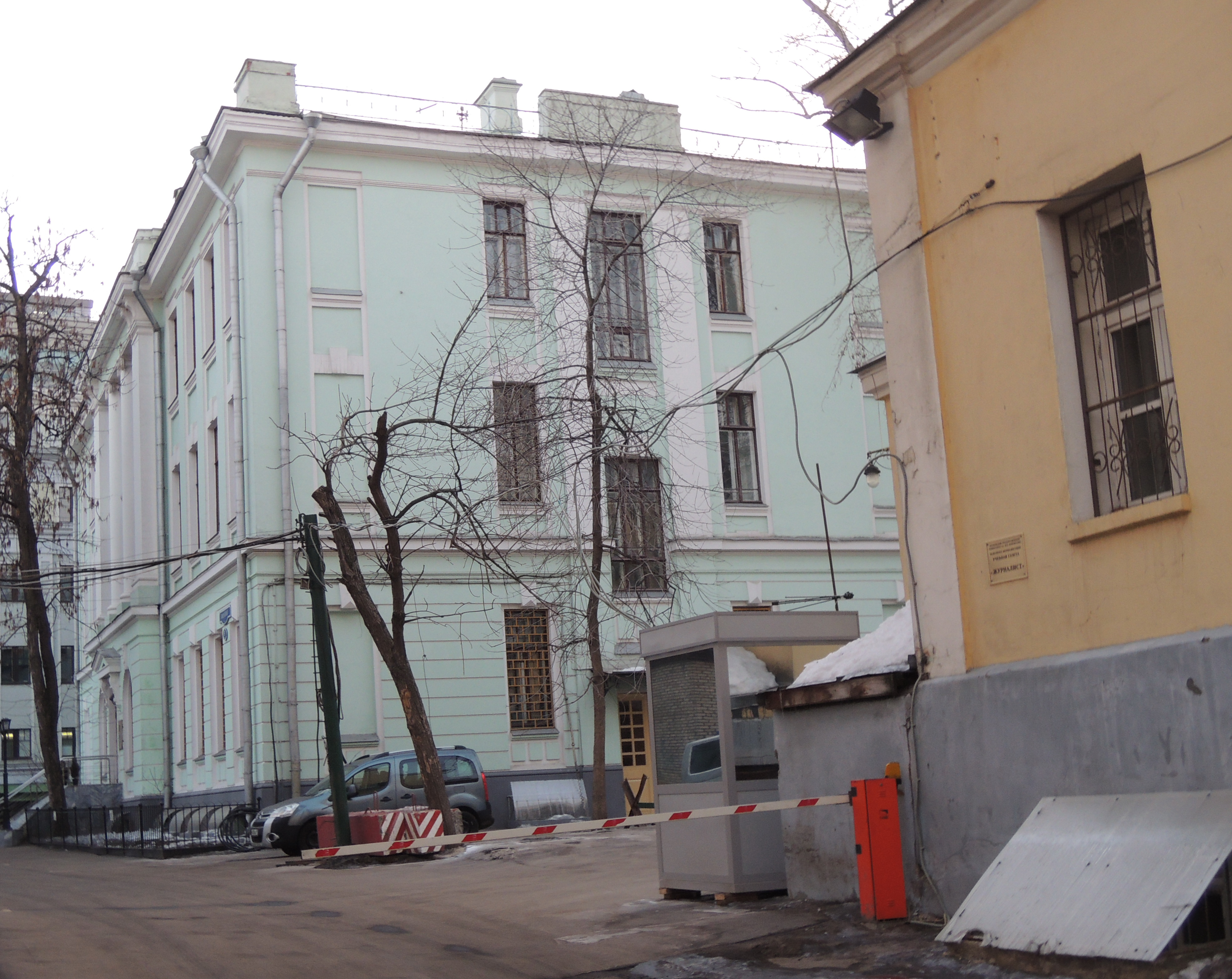 Институт психологии РАО. Находится во внутреннем дворе Библиотеки МГУ.